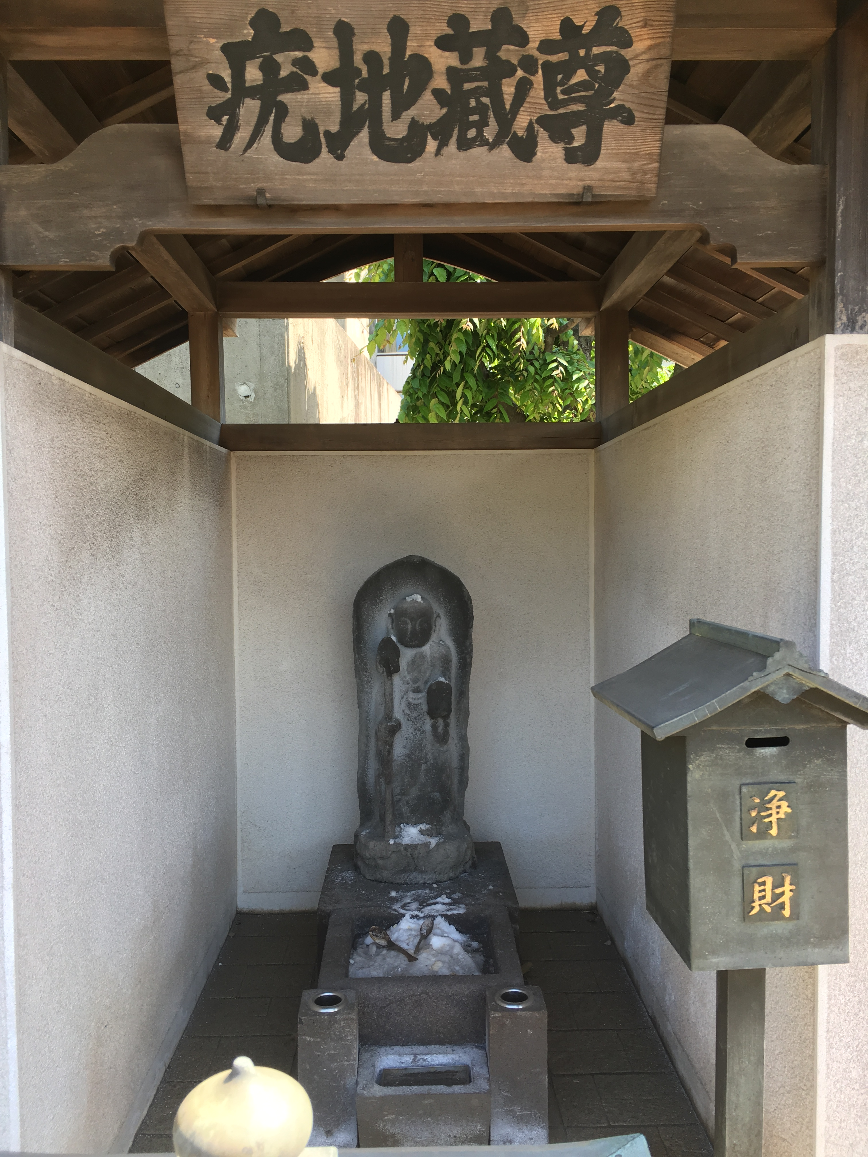 胤重寺の疣地蔵。塩地蔵とも呼ばれる。